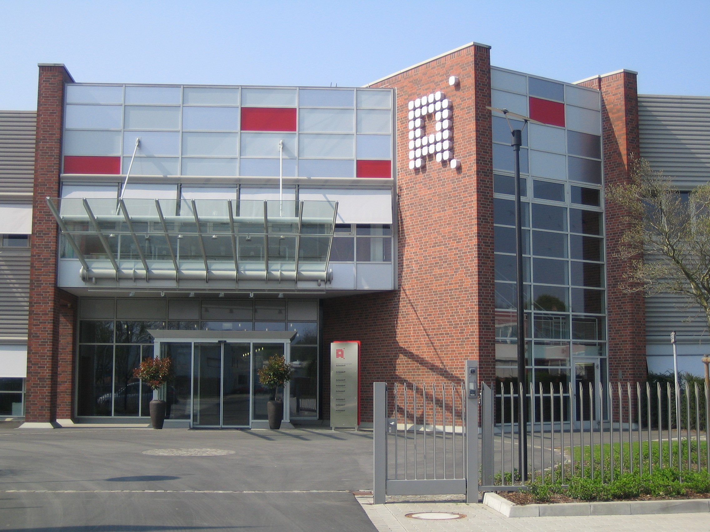 Unternehmenszentrale der Unternehmensgruppe Aschendorff, Hansalinie 1, 48163 Münster